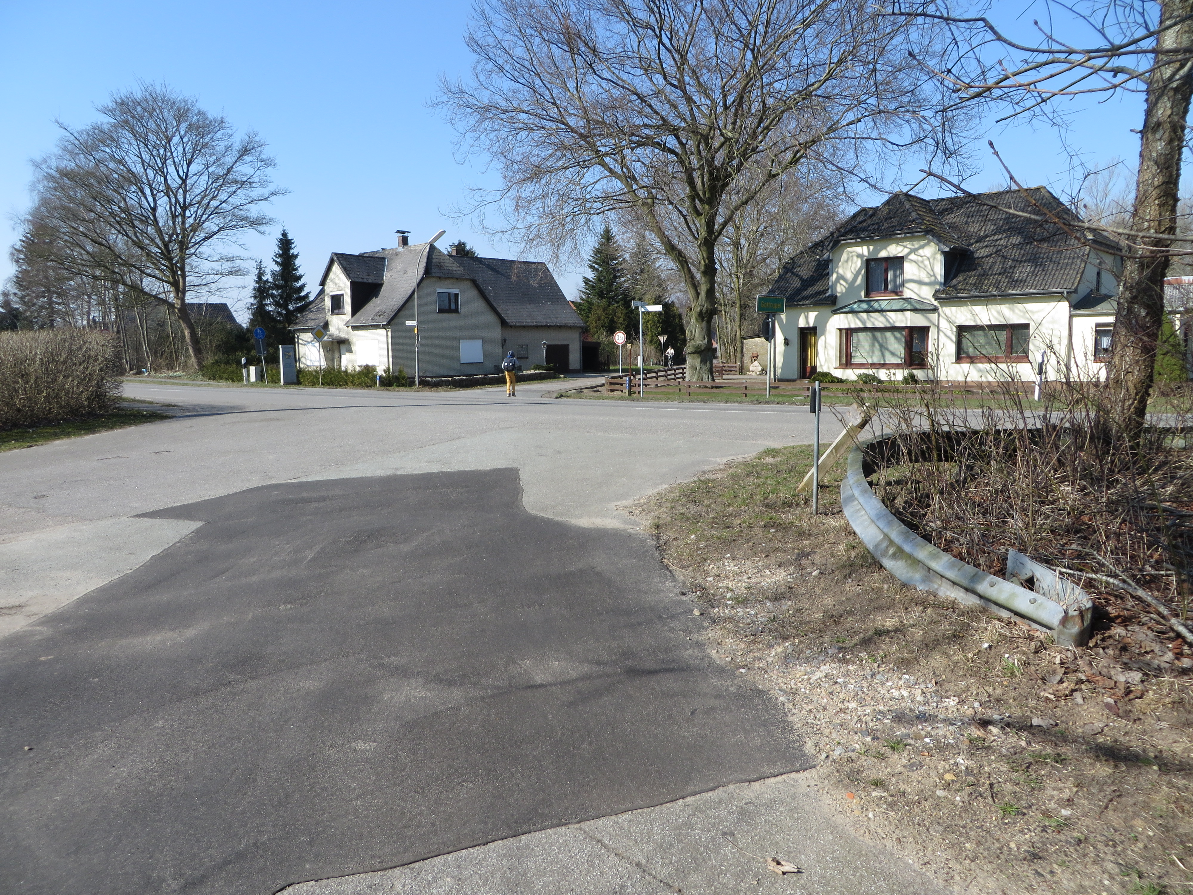 Gottrupel an der Lecker Chaussee, Bild 02; Die Häuser rechts des Stadtweges dürfen zu Flensburg gehören